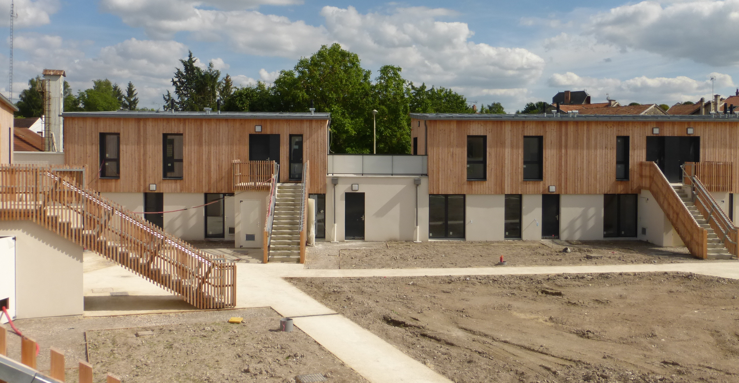 Photo de la cour intérieure du pôle intergénérationnel rue du Vieux Grenier à Sel - 2015